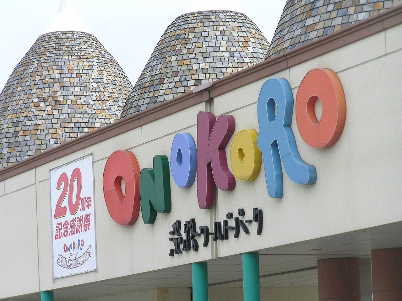 淡路ワールドパークONOKORO 入り口